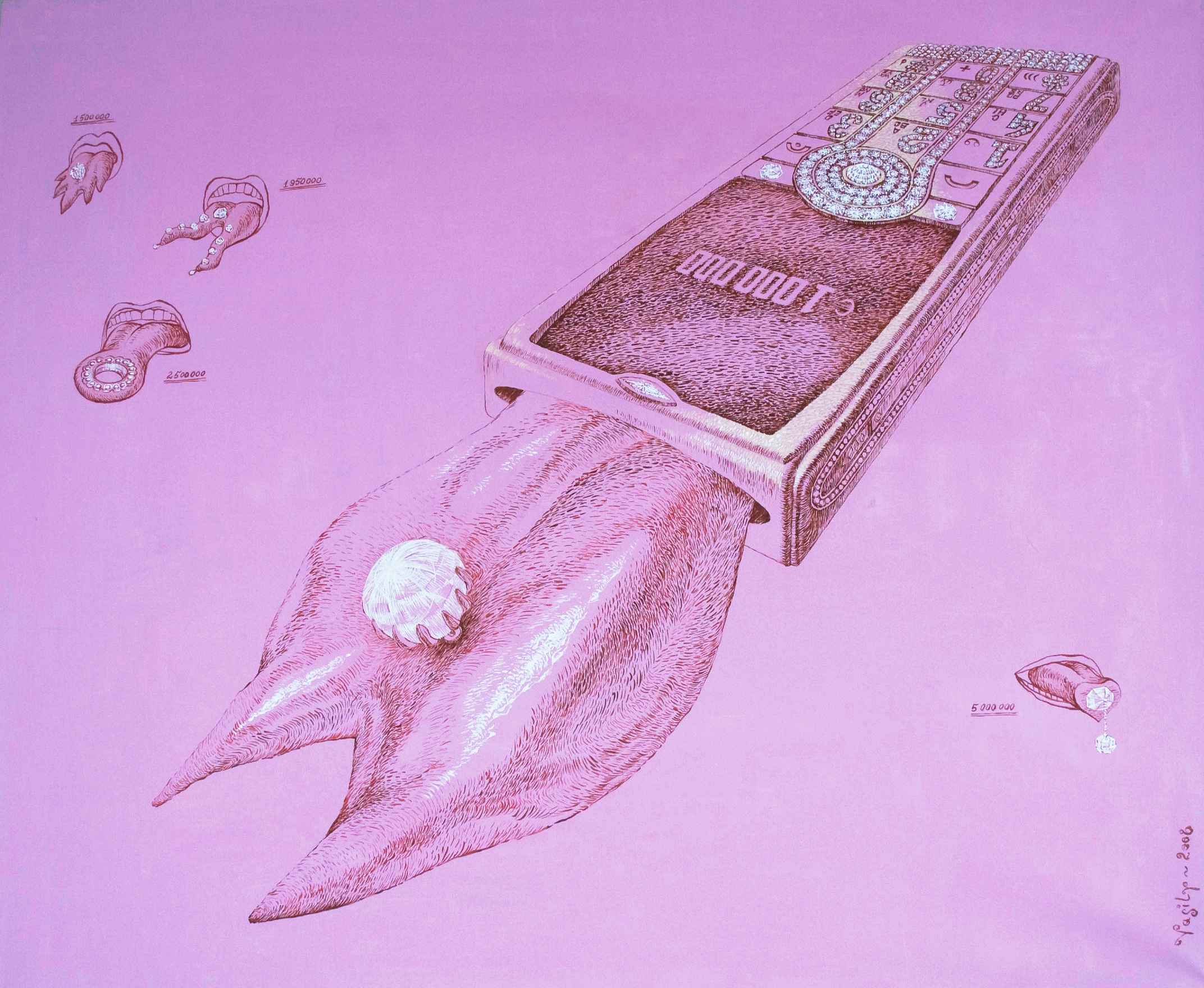 Э. ПИАФИЯ. Холст, масло, 195Х145 см. 2016 г